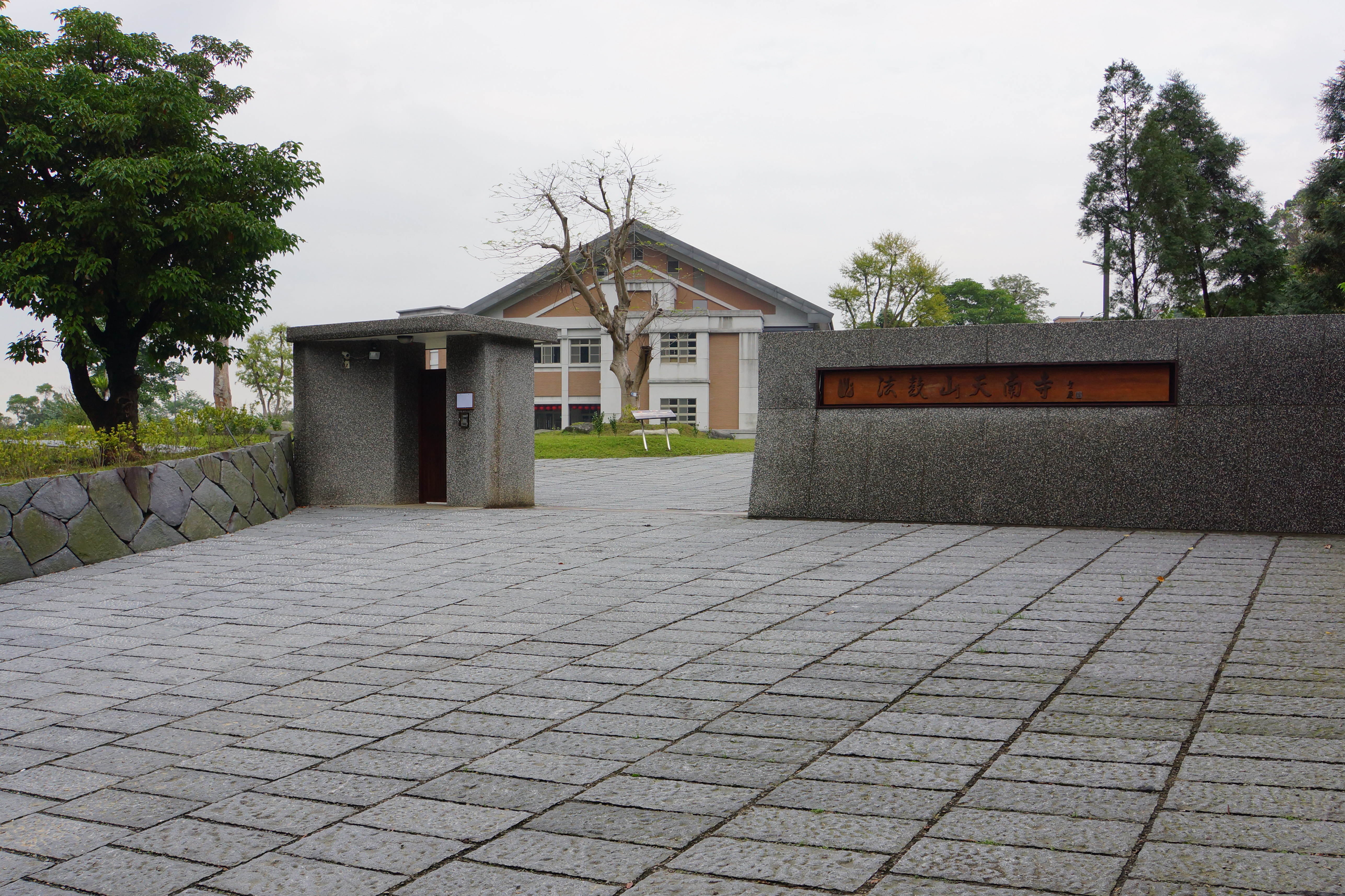 法鼓山天南寺 Dharma Drum Mountain Tiannan Monastery